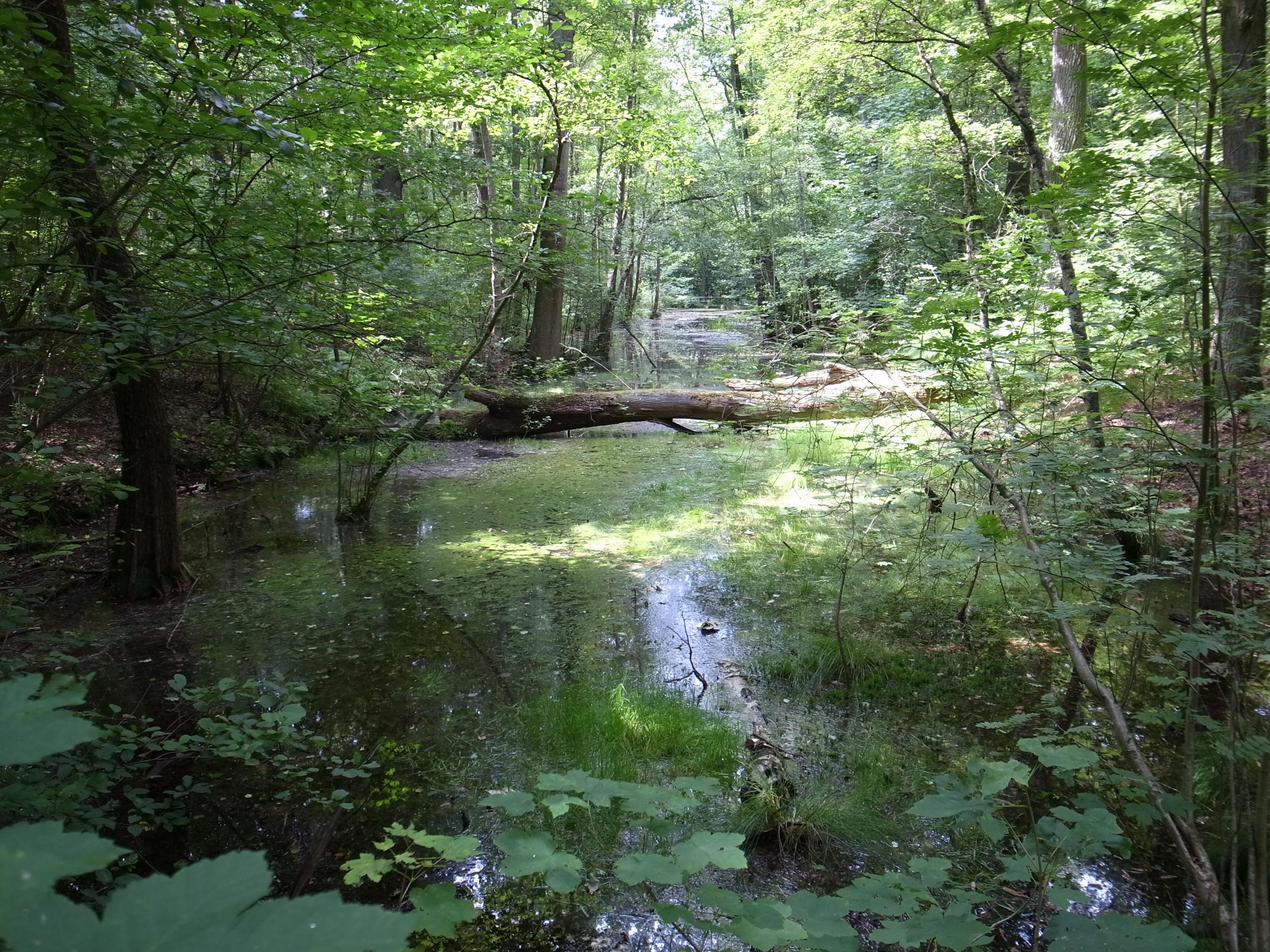 Coswig (Anhalt), Roter Teich am Wanderweg Bismarckstieg und Standort vom Bähr-Gedenkstein im FFH Gebiet Pfaffenheide-Wörpener Bach nördlich Coswig.